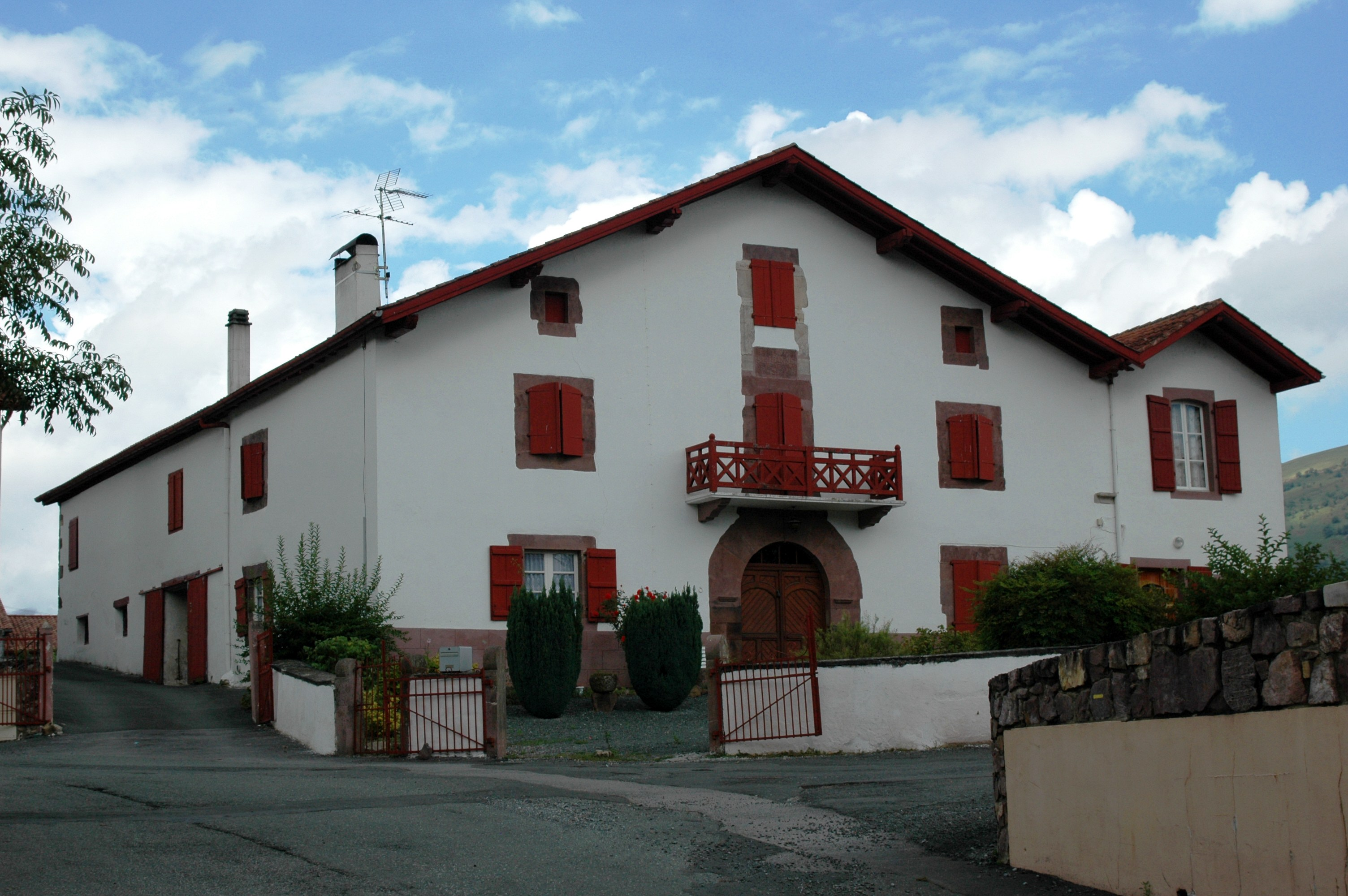 Anhaux - Maison de Basse-Navarre